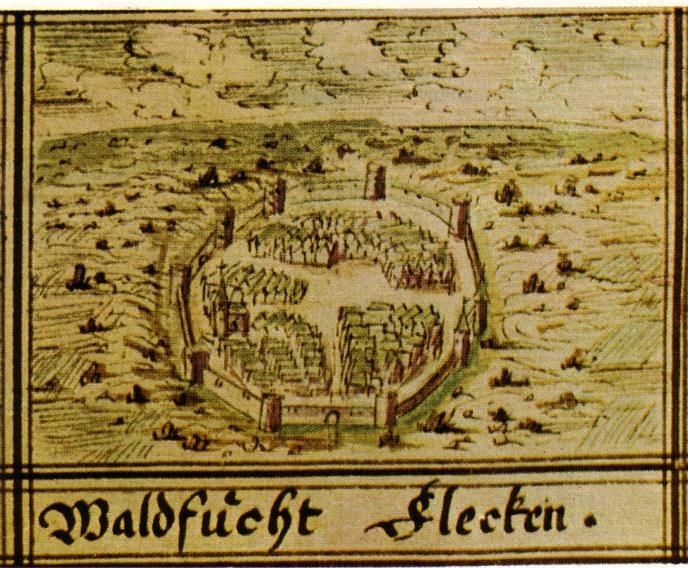 Waldfeucht